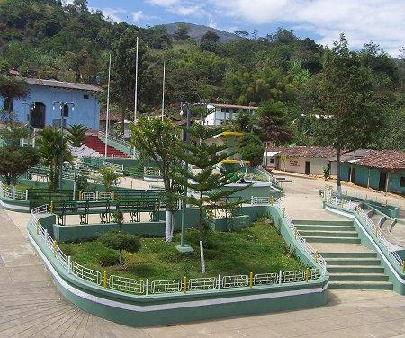 Plaza de Armas Sicchez